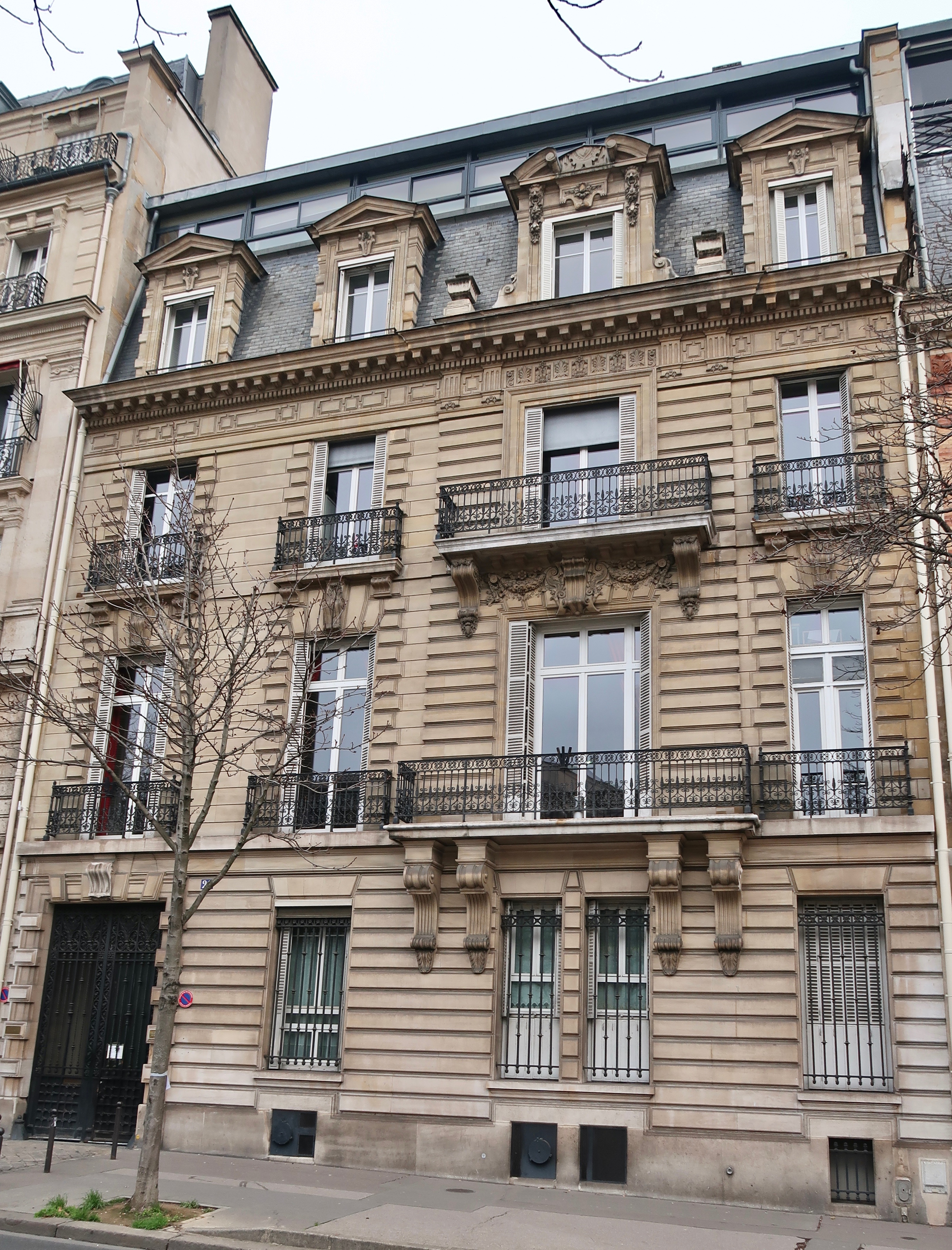 École française d'Extrême-Orient, 22 avenue du Président Wilson (Paris, 16e).